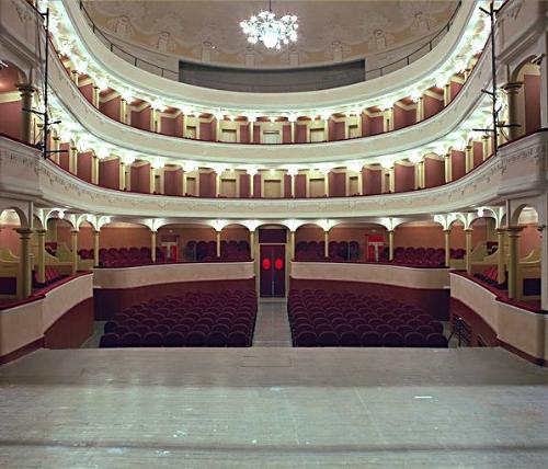 Teatro comunale di San Felice sul Panaro (interno)